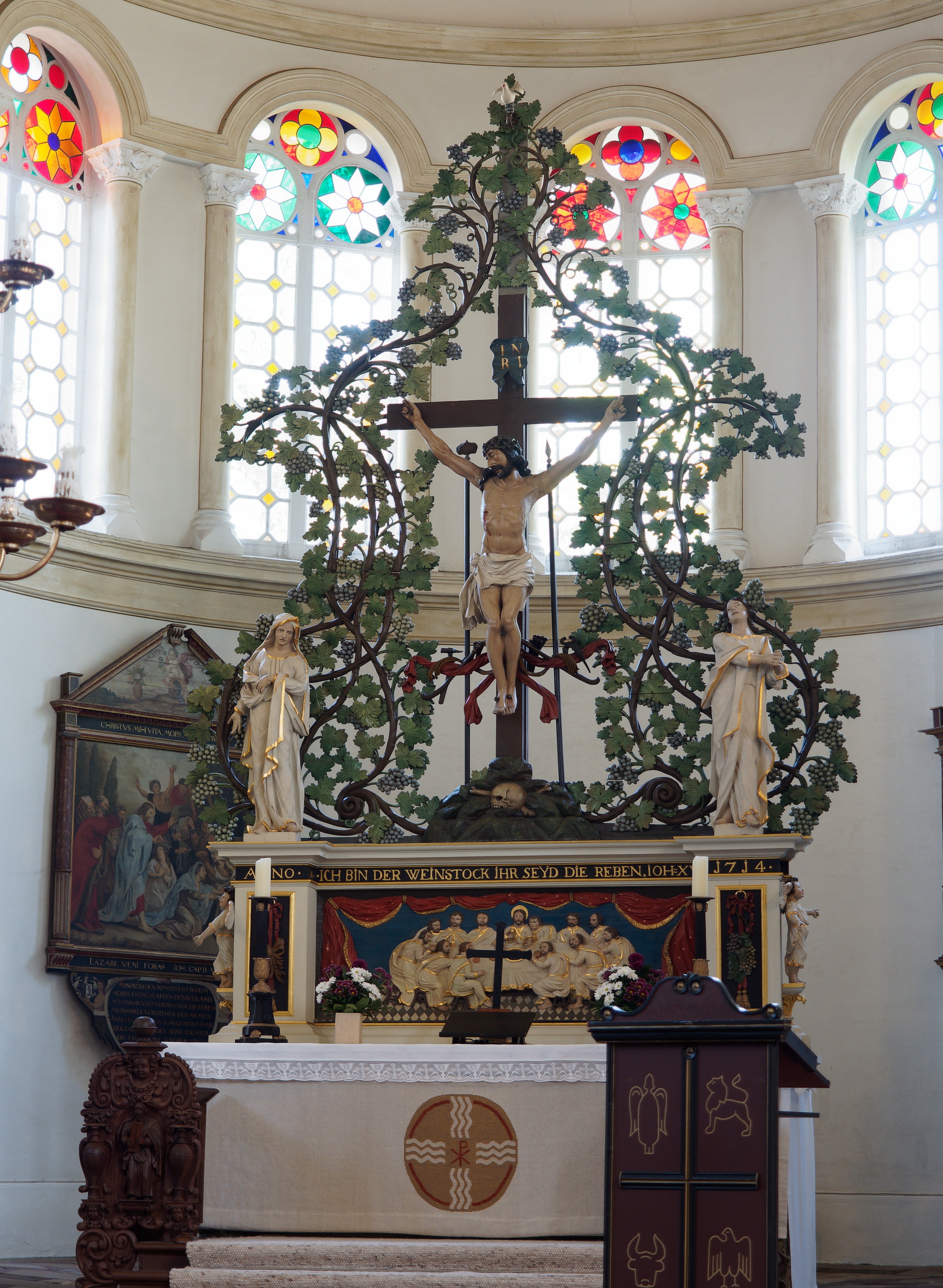 Altar in der St. Magnus Kirche in Esens (Kreis Wittmund, Ostfriesland).